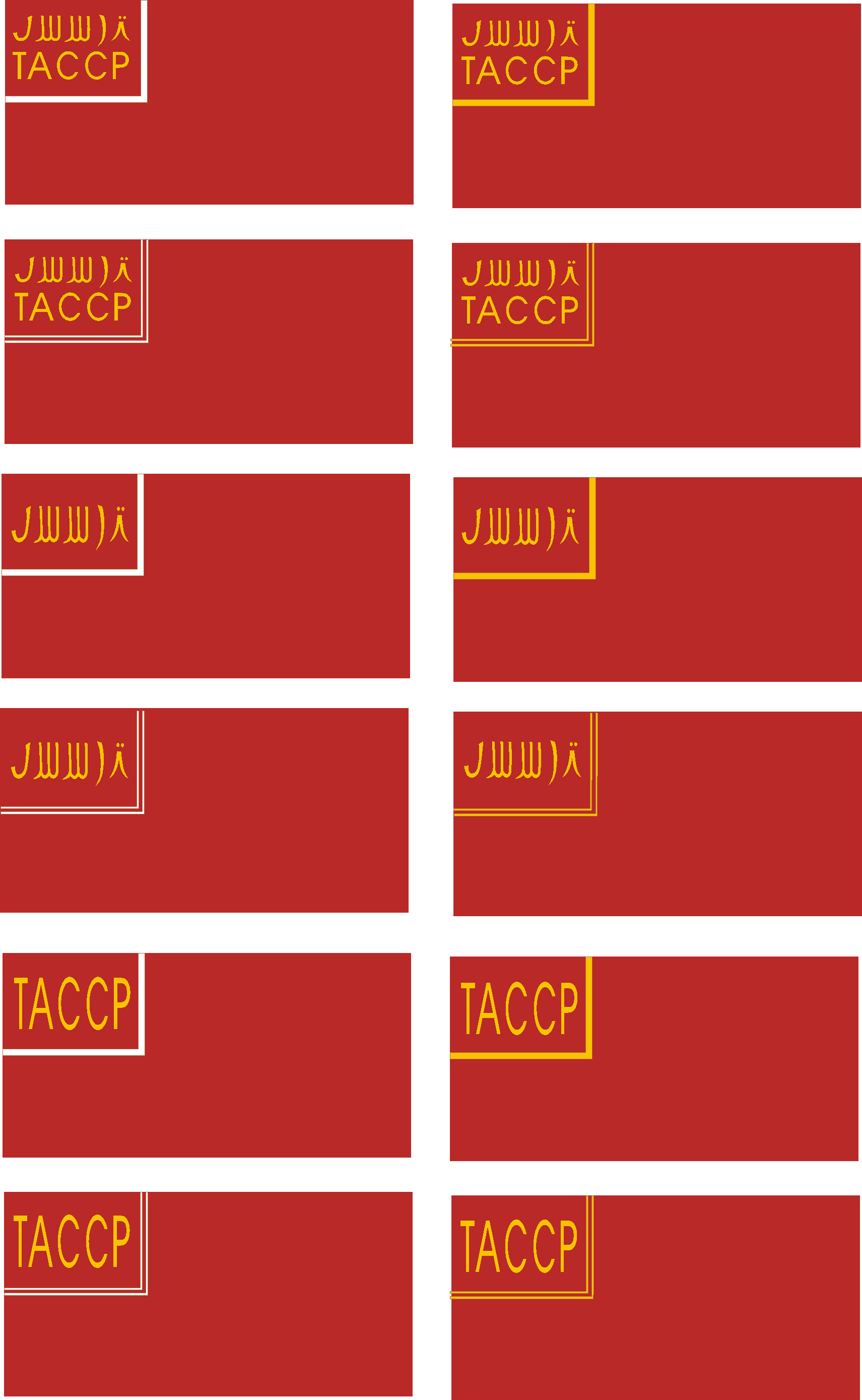 RSSA del Turquestan Unknown